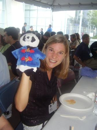 Eva Vertes